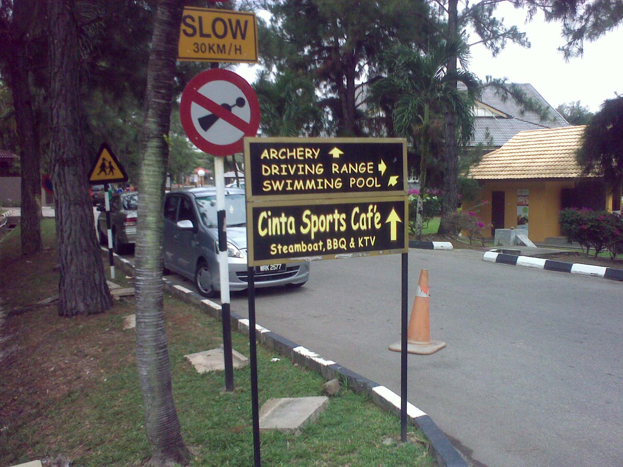 Cinta Sayang Resort Sungai Petani